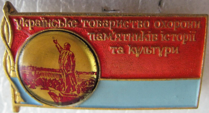 Знак члена Українського товариства охорони пам'ятників